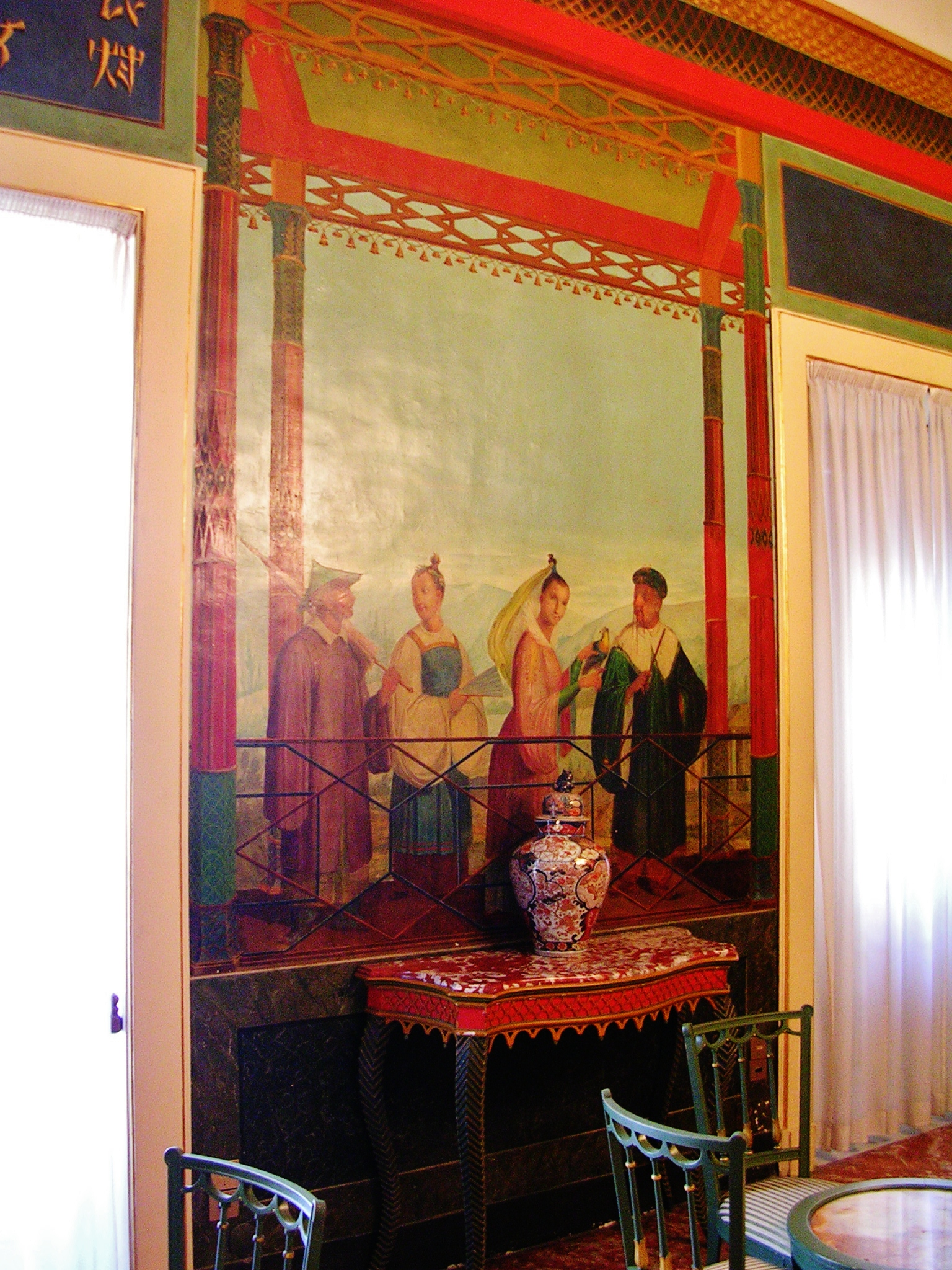 Sala cinese - Palazzo dei Normanni a Palermo - Sicily - Italy